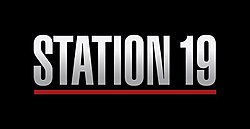 Logotiopo